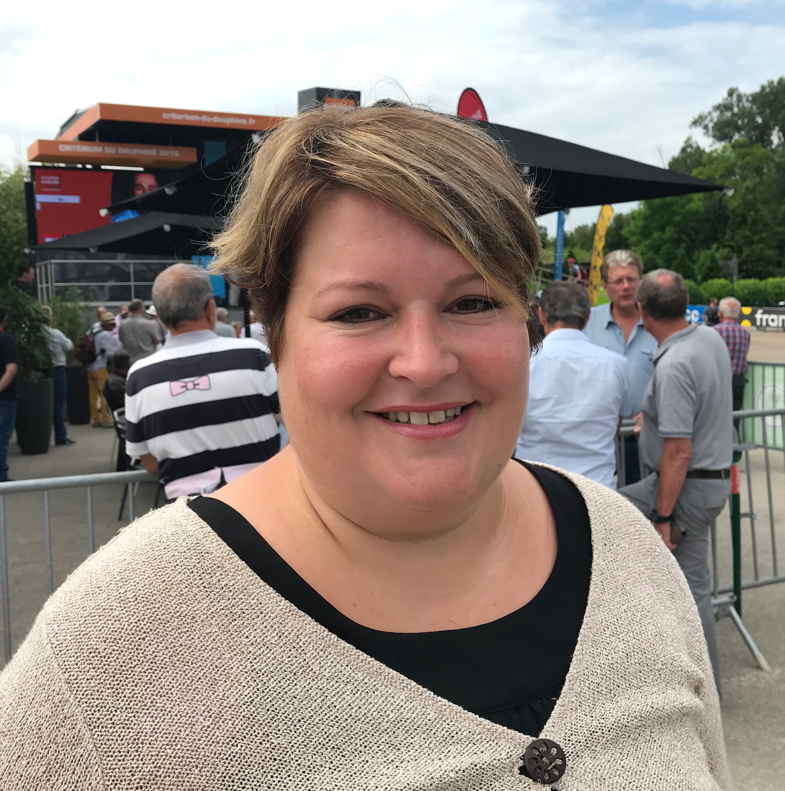 Stéphanie Pernod-Beaudon en marge d'un départ d'étape du Critérium du Dauphiné à Chazey-sur-Ain.